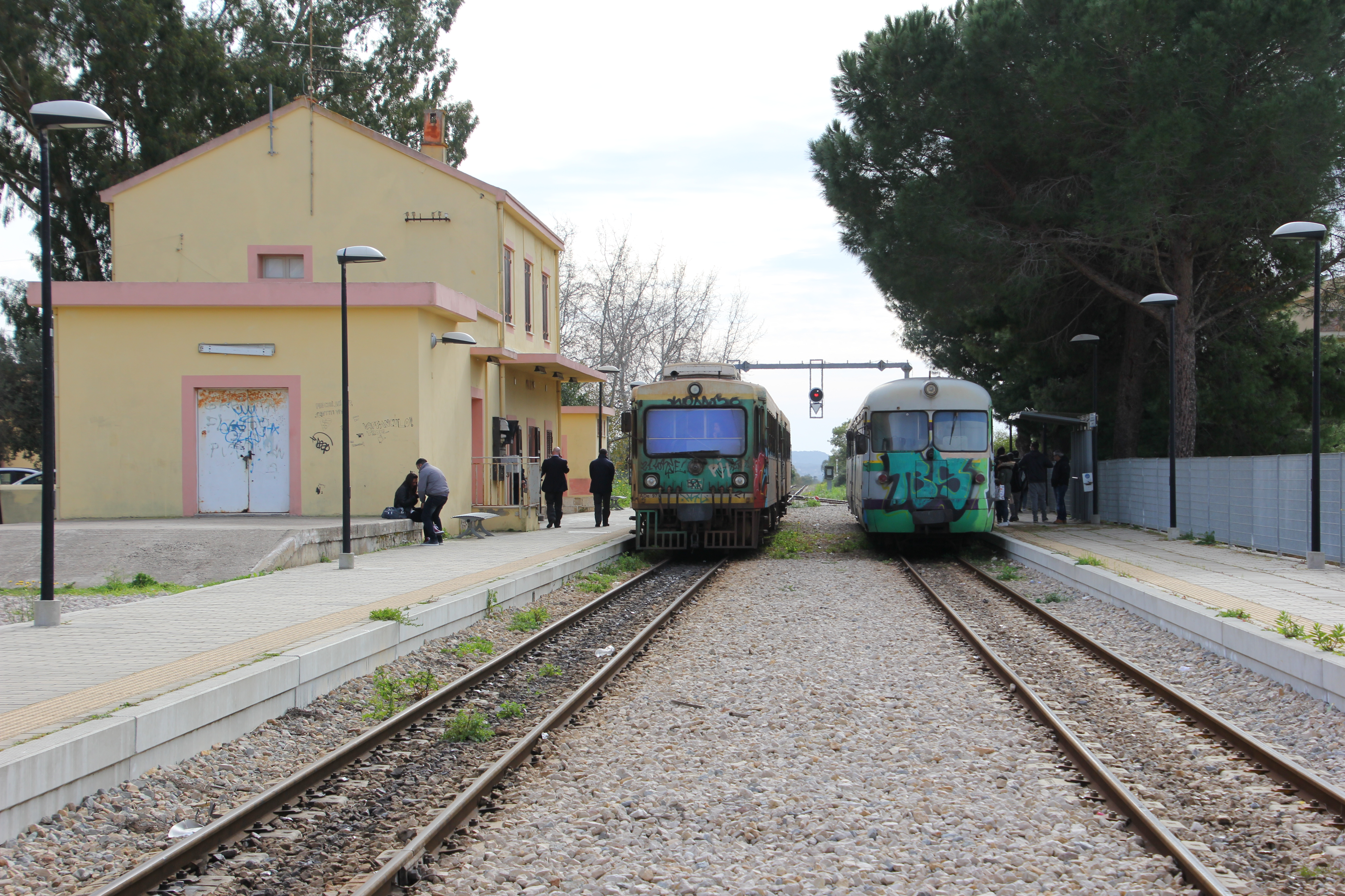 Olmedo - Stazione ferroviaria